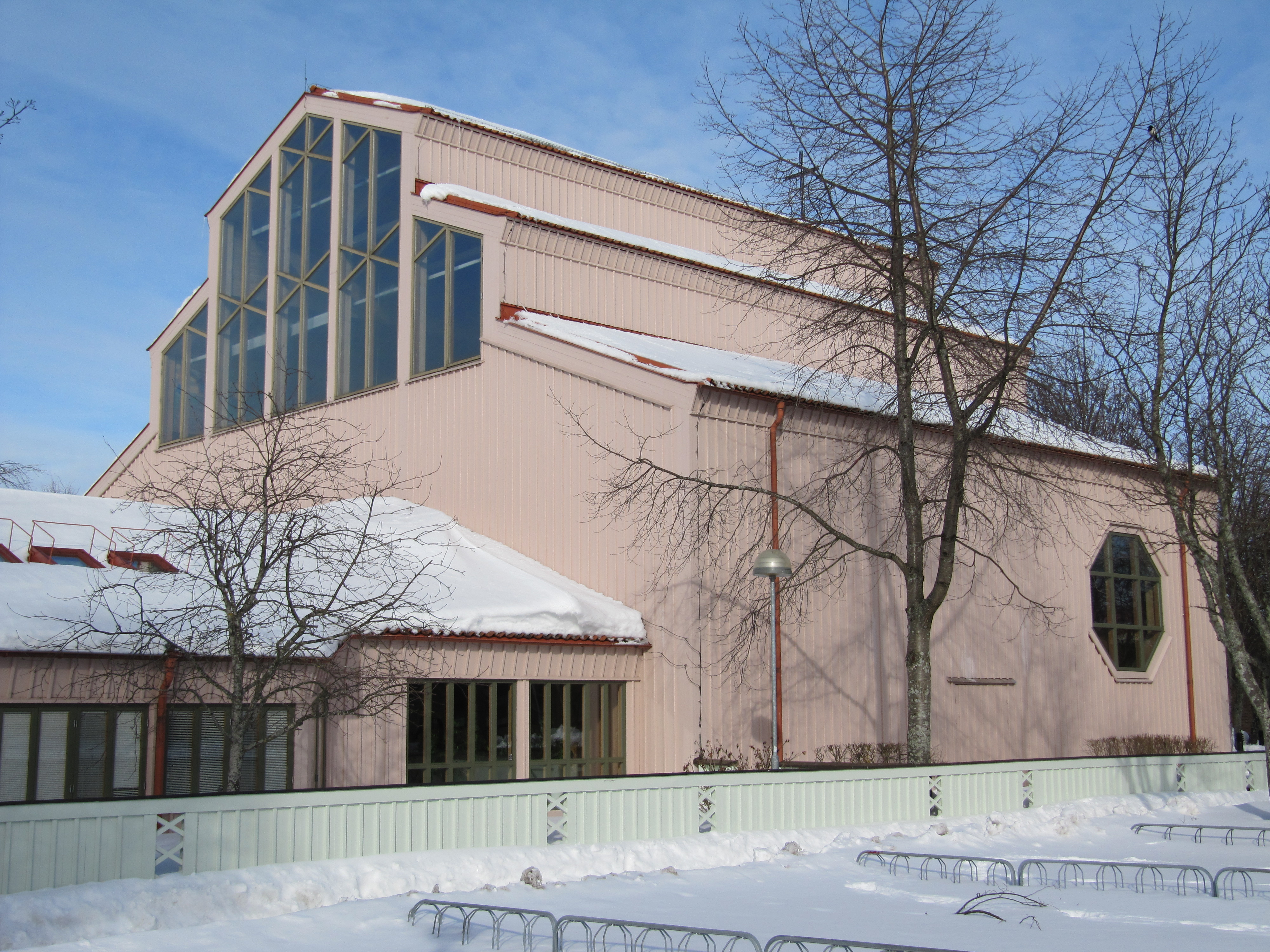 Gottsunda kyrka